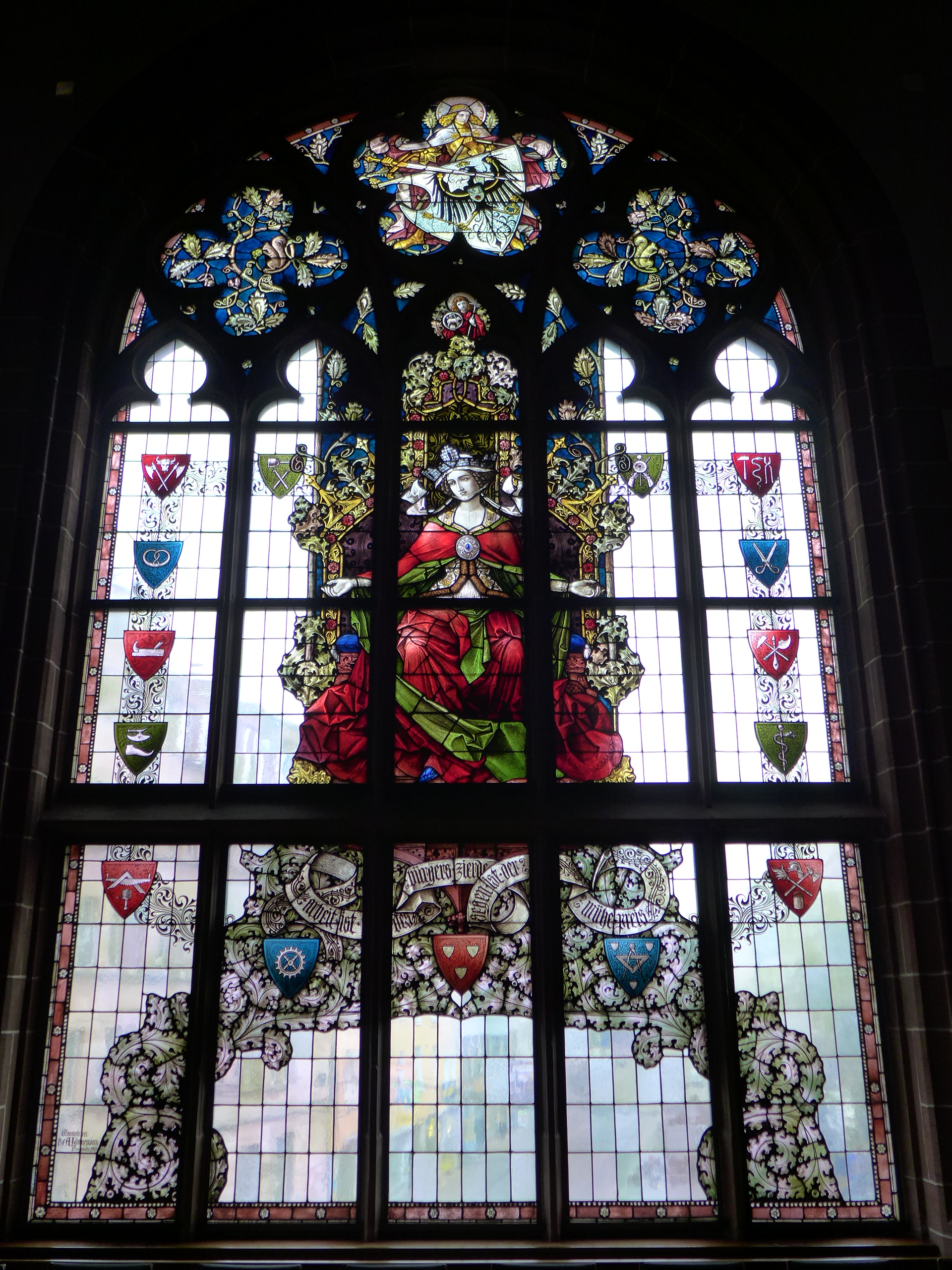 Rathaus St. Johann, Festsaal, Glasgemälde "Allegorie der Stadt St. Johann mit Zunftwappen ortsansässiger Gewerbe"